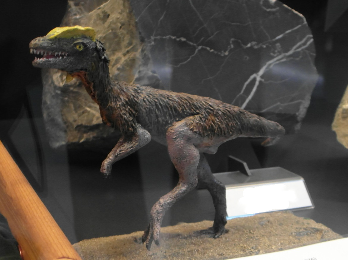 Malý model dinosaura Coelurosaurichnuse v muzeum TANAPu